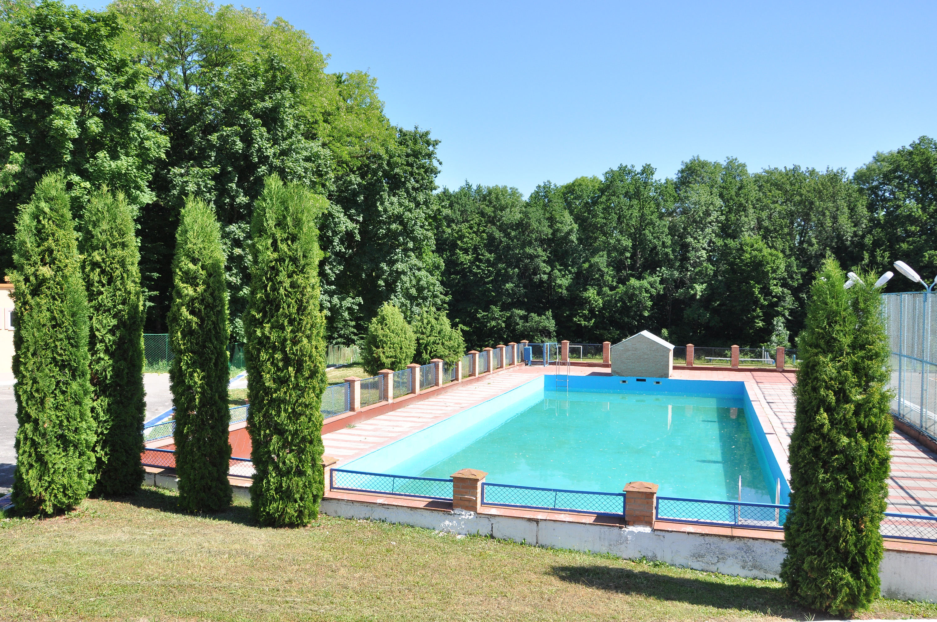 Басейн у навчально-оздоровчому комплексі «Червона калина» Тернопільського державного медичного університету імені І. Я. Горбачевського.